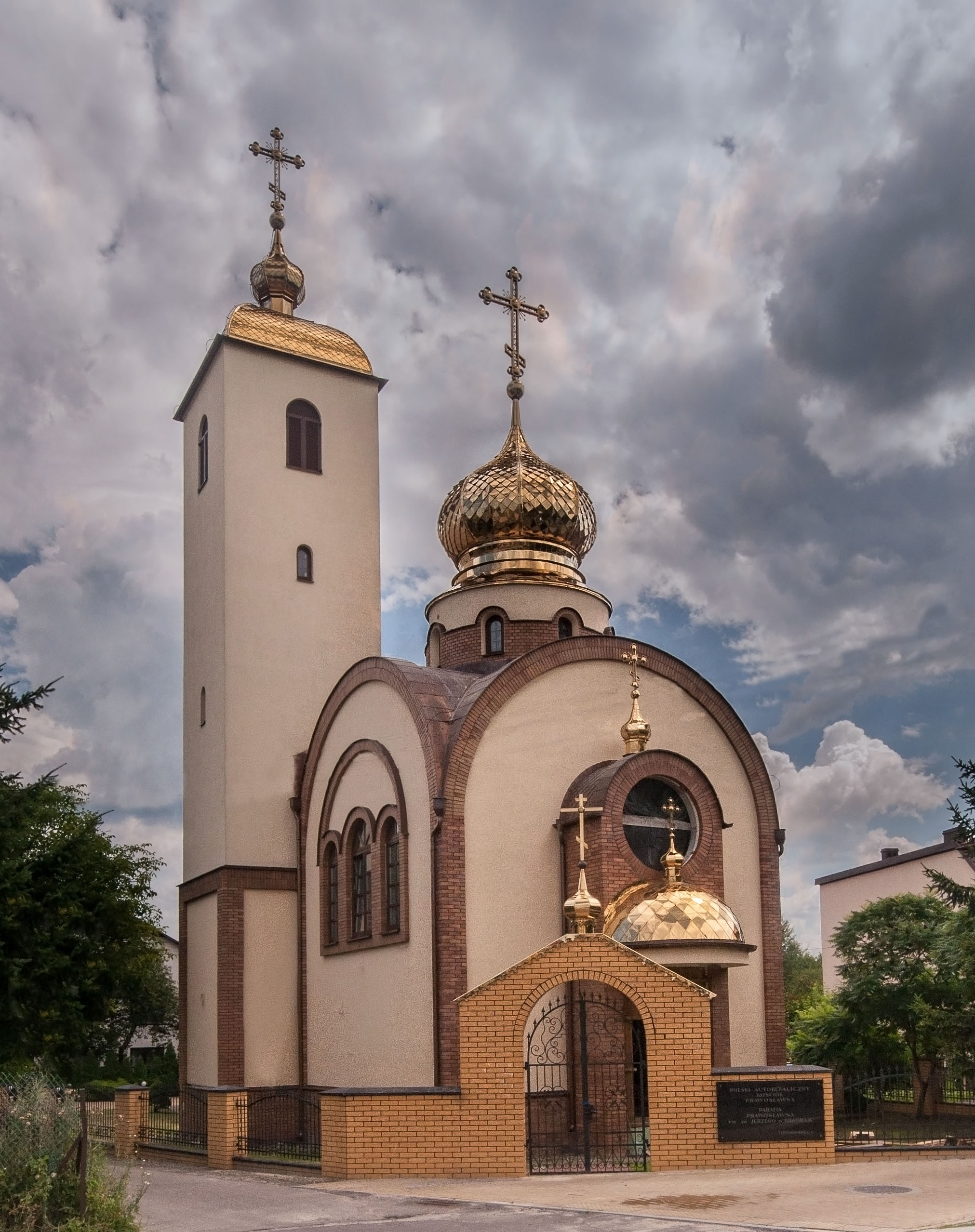 Cerkiew św. Jerzego w Biłgoraju